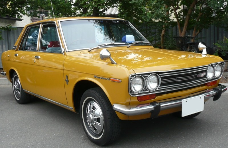 Datsun Bluebird 510 1800 SSS.